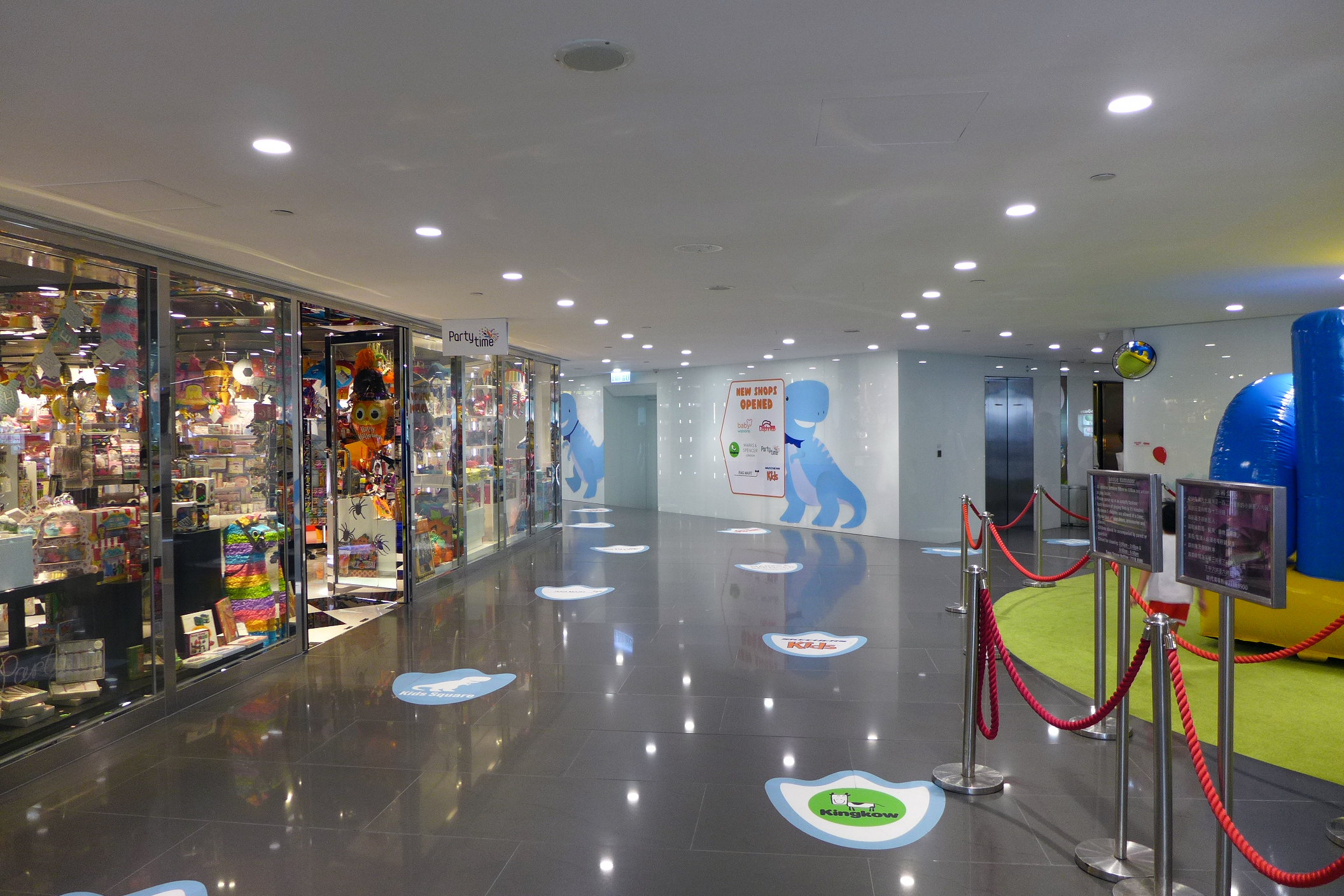 Times Square Level 13A